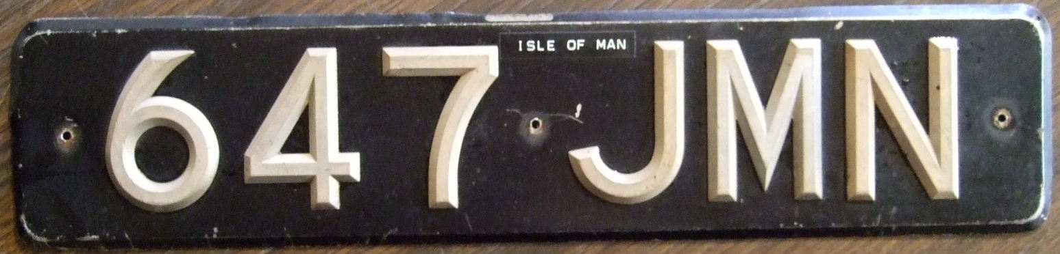 U.K. ISLE OF MAN 1960'S